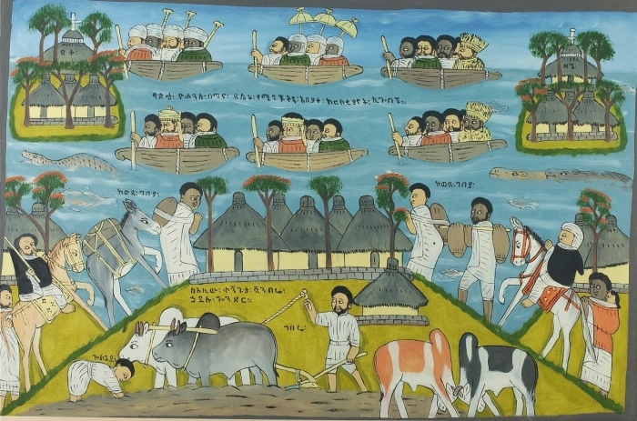 De betekenis van de Amhaarse teksten, van links naar rechts en van boven naar beneden: 1) DeK (een groot eiland in Lake Tana) 2) Zegie (een schiereiland in Lake Tana) 3) De Heilige Johannes bezoekt de kerken op het eiland in Lake Tana 4 en 5) De terugkeer van de markt naar huis 6) Geschilderd door Kegngetta (titel) Jember Hailu te Gonder 7) Een boer ploegt het bouwland 8) Een boerin wiedt het onkruid